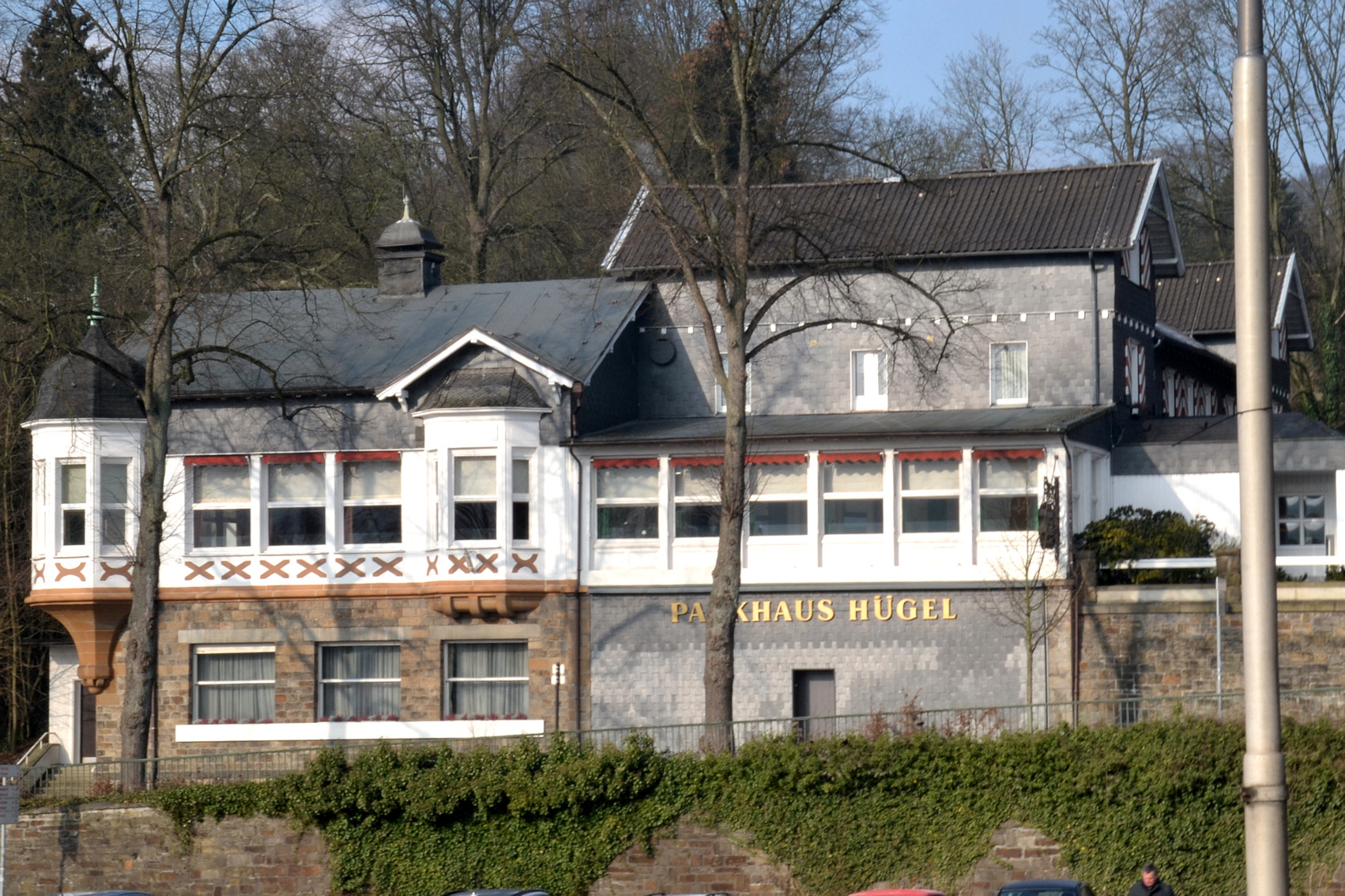 Parkhaus Hügel in Essen-Werden, zum Gebäude-Ensemble der Villa Hügel gehörig